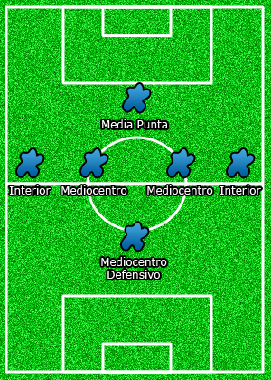 Posiciones de centrocampistas en el fútbol.